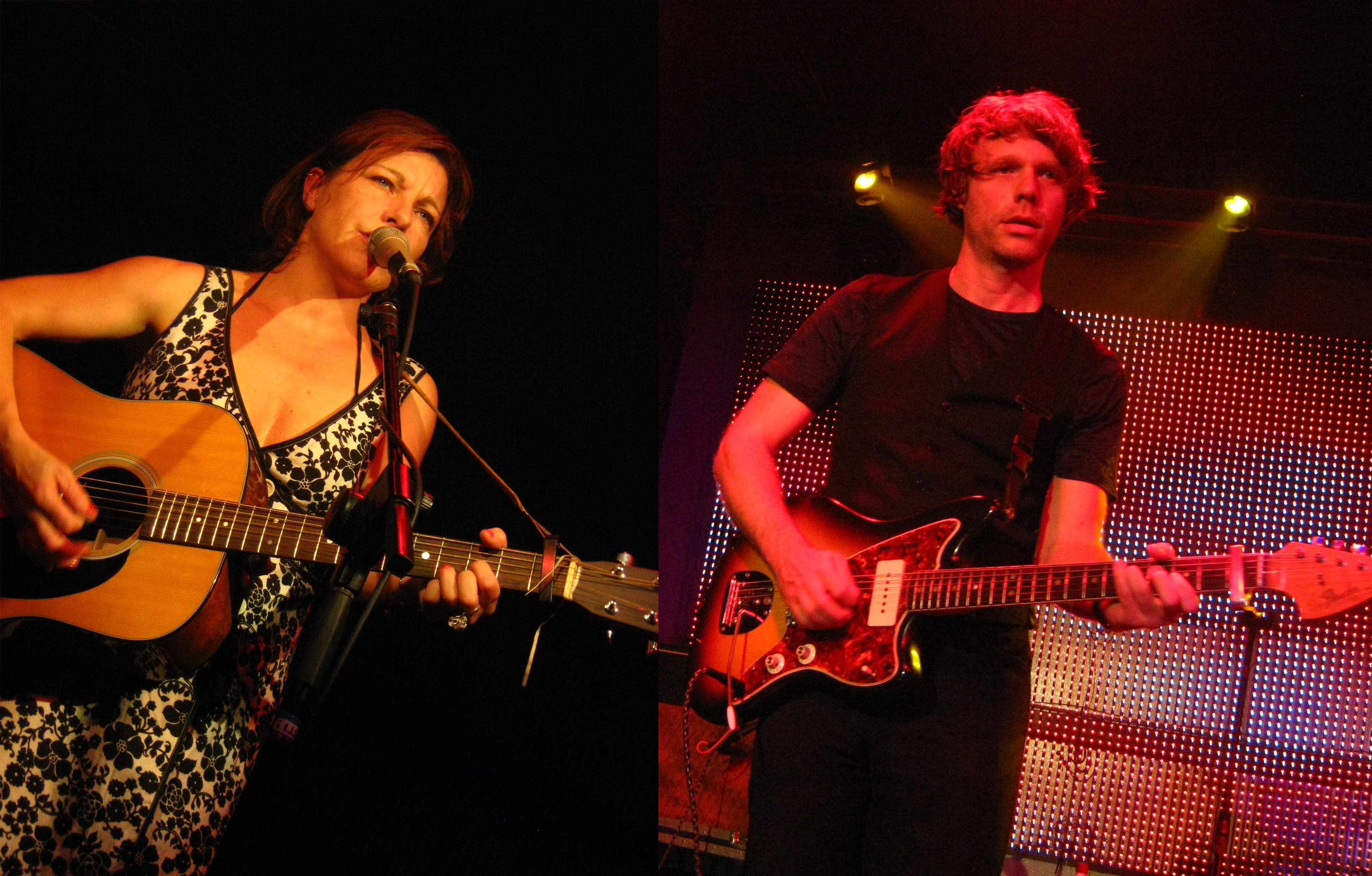 Los franceses Armelle Pioline y Dominique Dépret alias «Mocke», de la banda Holden, en 2009. Valparaíso, Chile. Fotografías originales tomadas por Omar Andrés León Torres y subidas a su galería personal de Flickr: bajo licencia CC BY-SA 2.0.